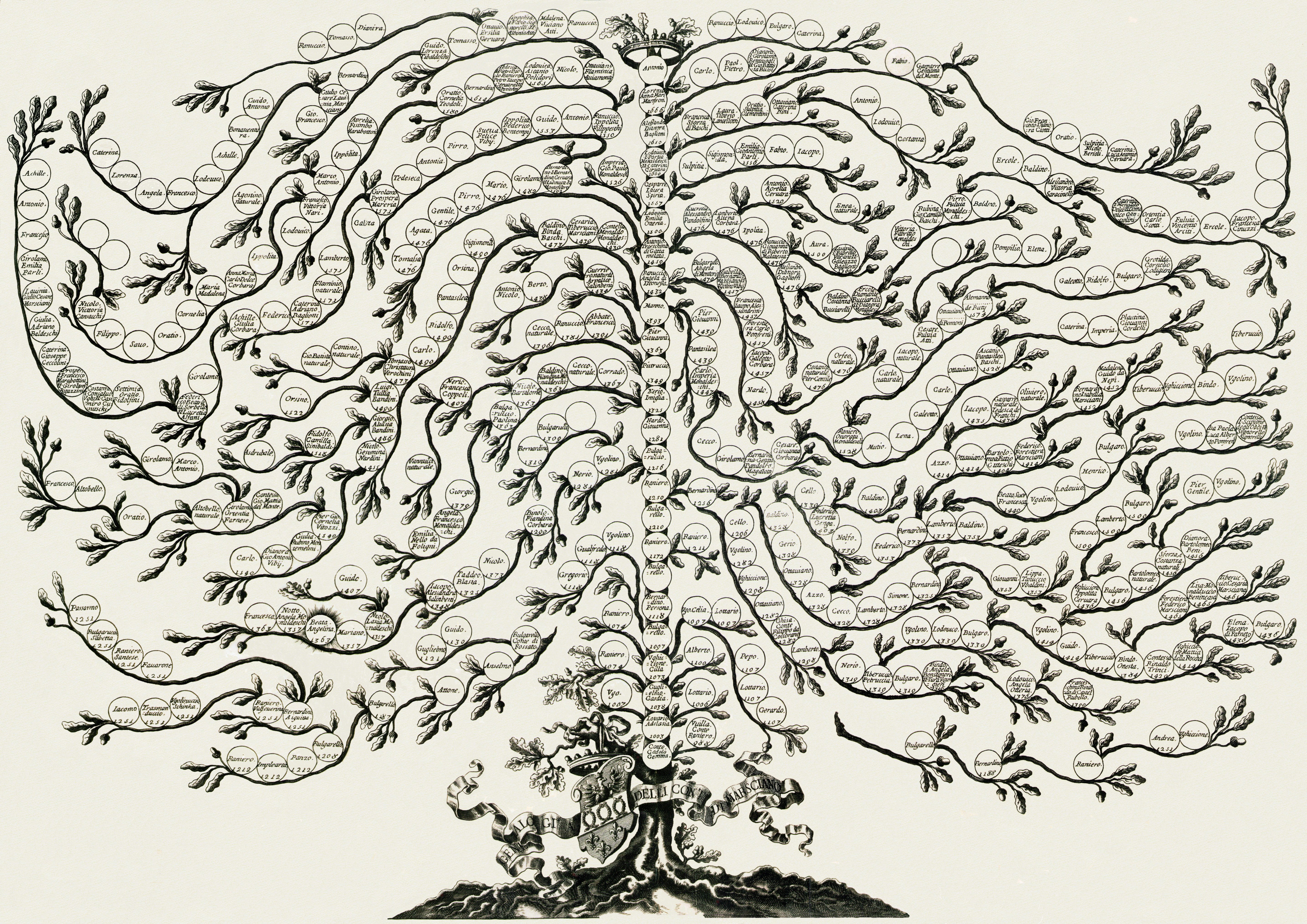 Albero genealogico dei Conti di Marsciano pubblicato in "Albero et istoria della famiglia dè conti di Marsciano", di Ferdinando Ughelli, Roma 1667